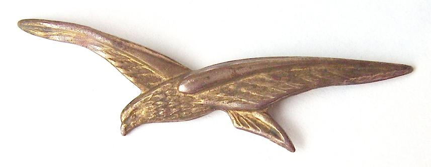 Epervier de calot de l'Armée de l'Air Française, aussi appelée charognard.